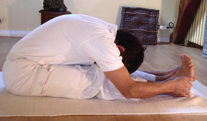 Yoga postures Paschimottanasana